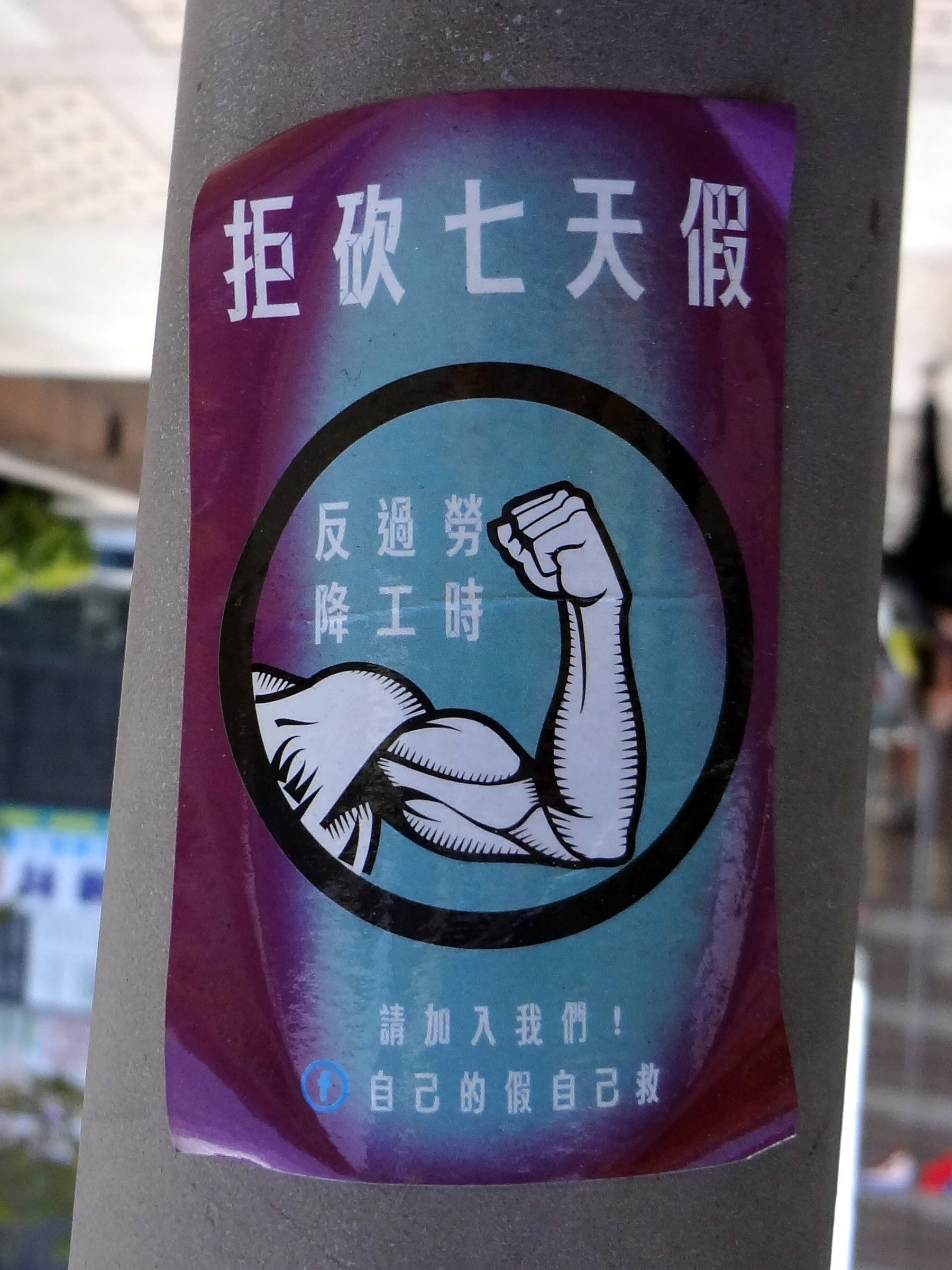 中文（台灣）: 2016年，勞工團體向蔡英文政府抗議的標語貼紙：拒砍七天假，反過勞，降工時，自己的假自己救！